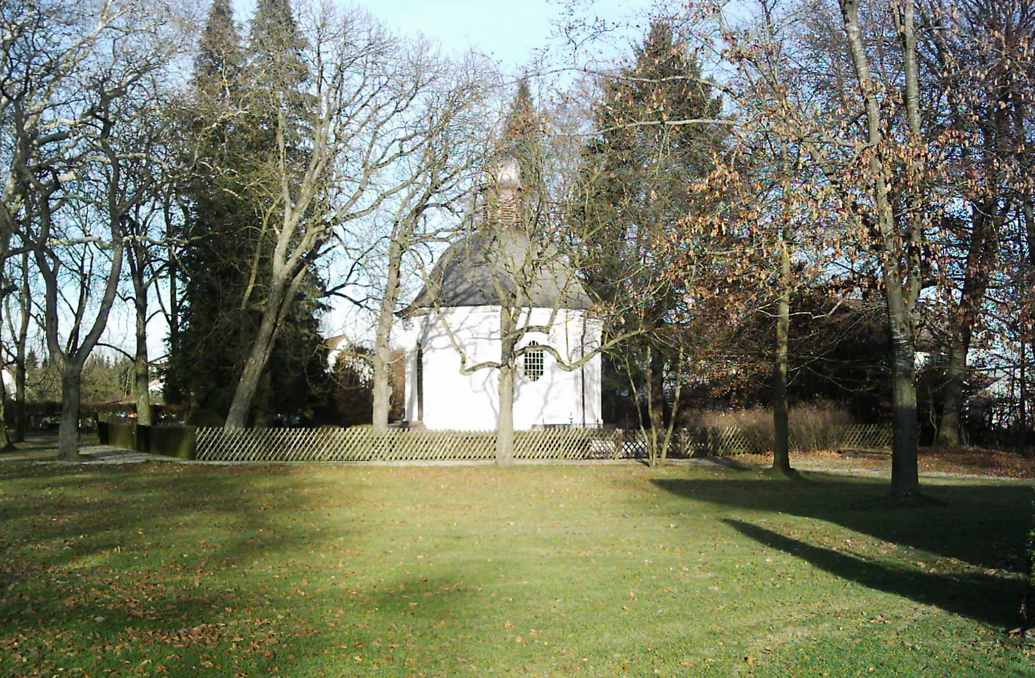 Gruft von Schaesberg